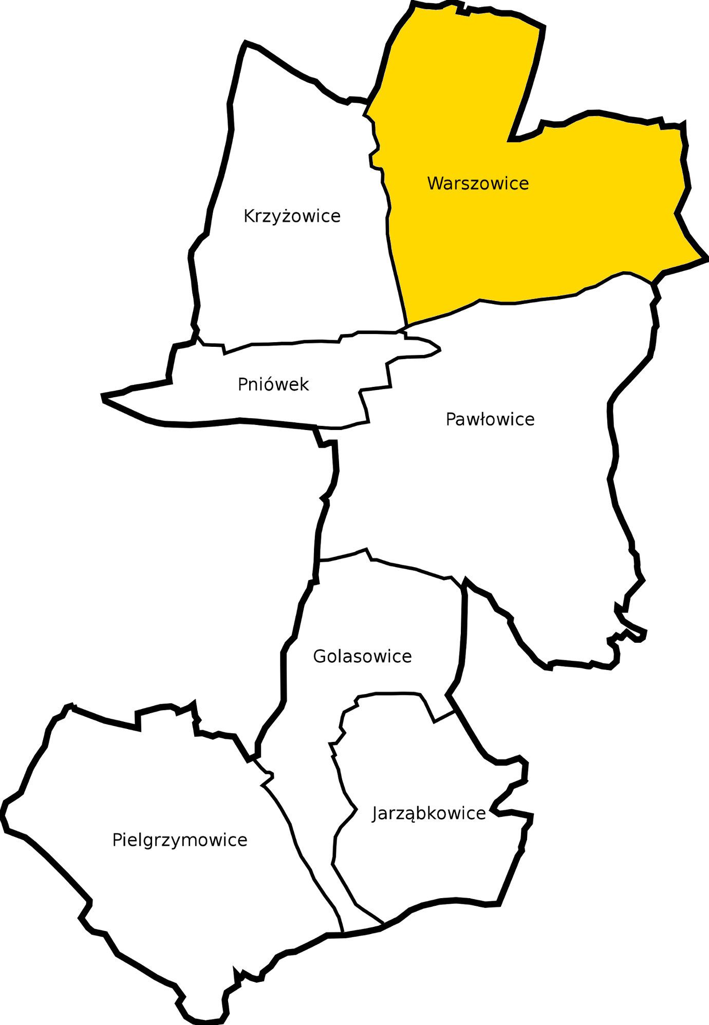 Sołectwo Warszowice na mapie gminy Pawłowice